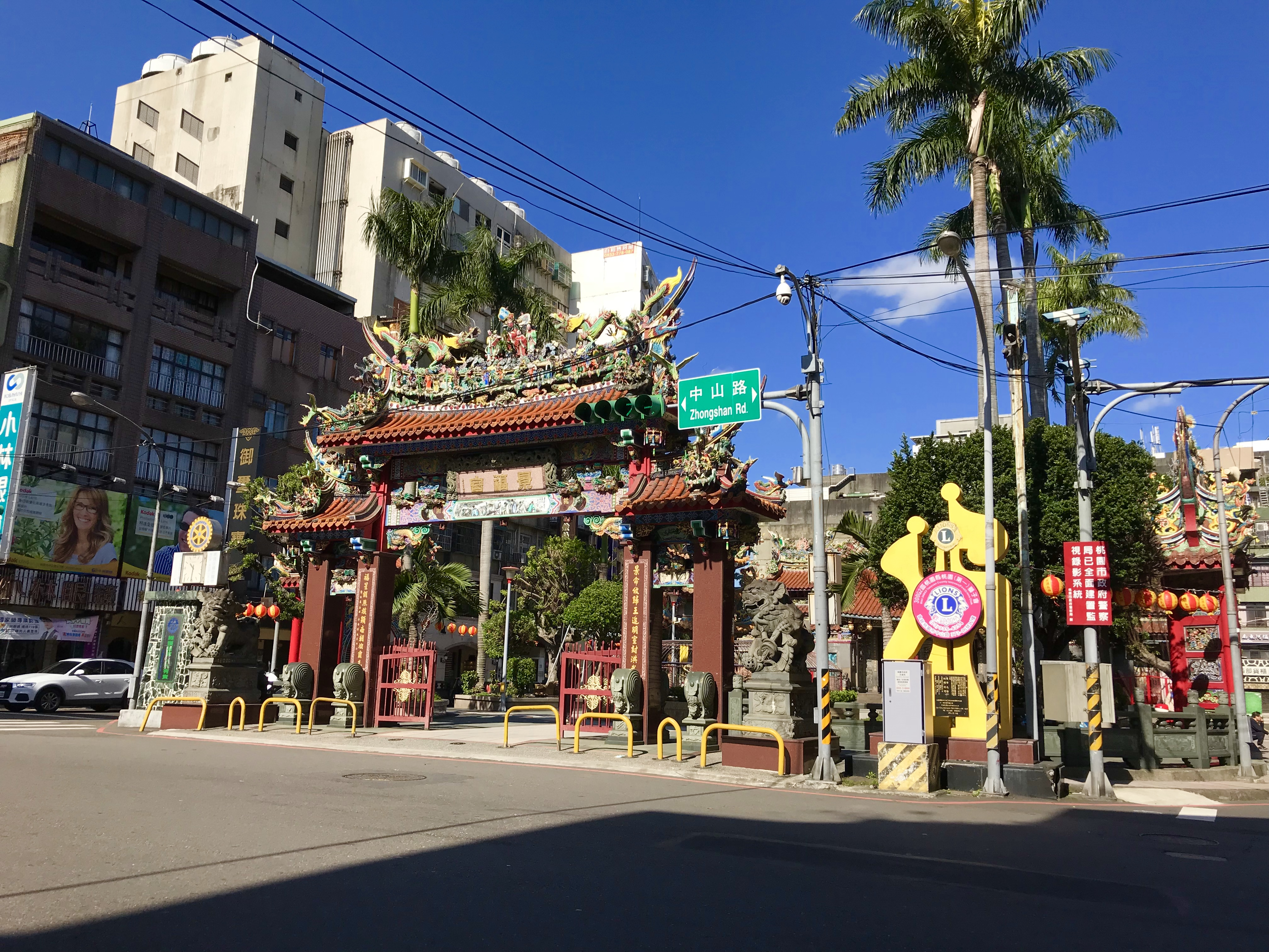 中文（台灣）: 桃園景福宮牌樓